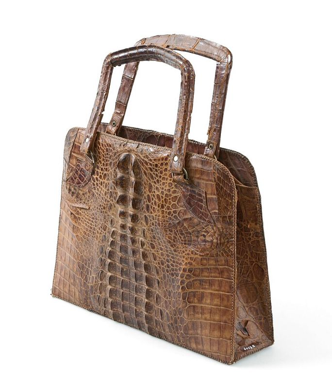 Tas. Handtas van krokodillenleer